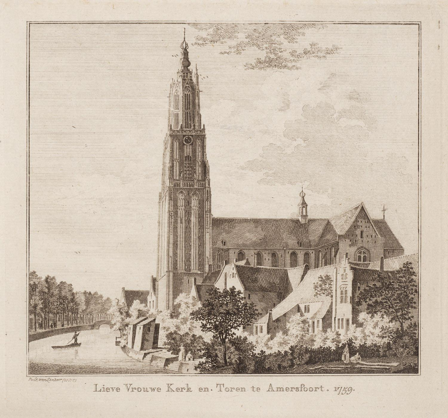 Gezicht op de stad Amersfoort. Rechts op de voorgrond loopt een boer naast een paard en wagen. In de verte ligt de stad waar verschillende gebouwen met namen zijn geduid. In de linker- en rechter bovenhoek wapenschilden, boven het stadsgezicht een banderol met de naam van de stad.